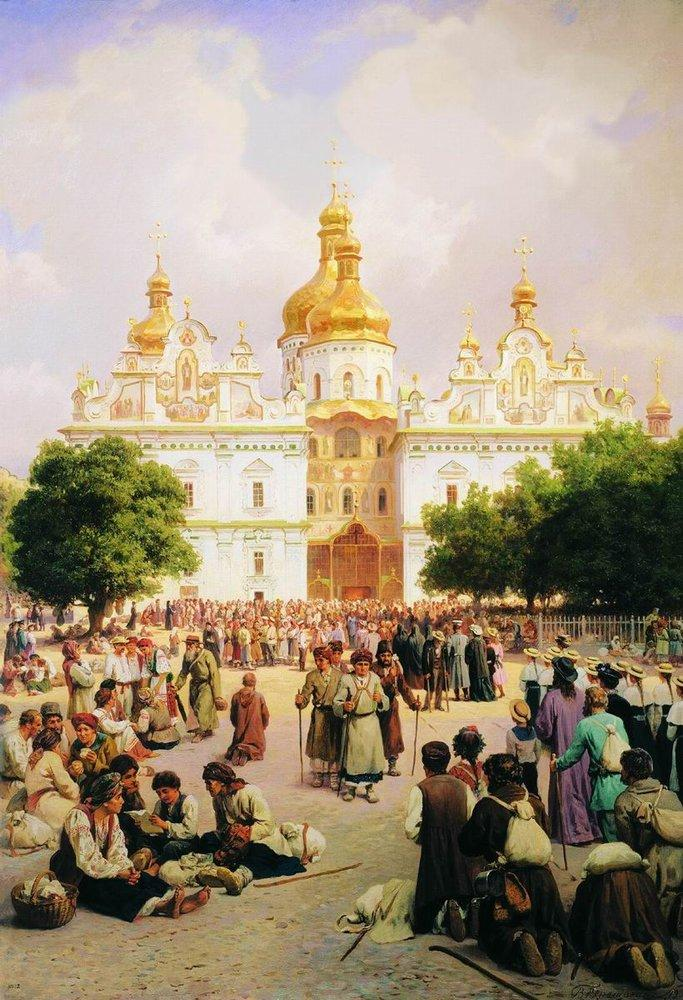 en: V. P. Vereschagin. The Great Church of Kievo_pe4erskaja_Lavra ru: В. П. Верещагин. Великая церковь Киево-Печерской лавры